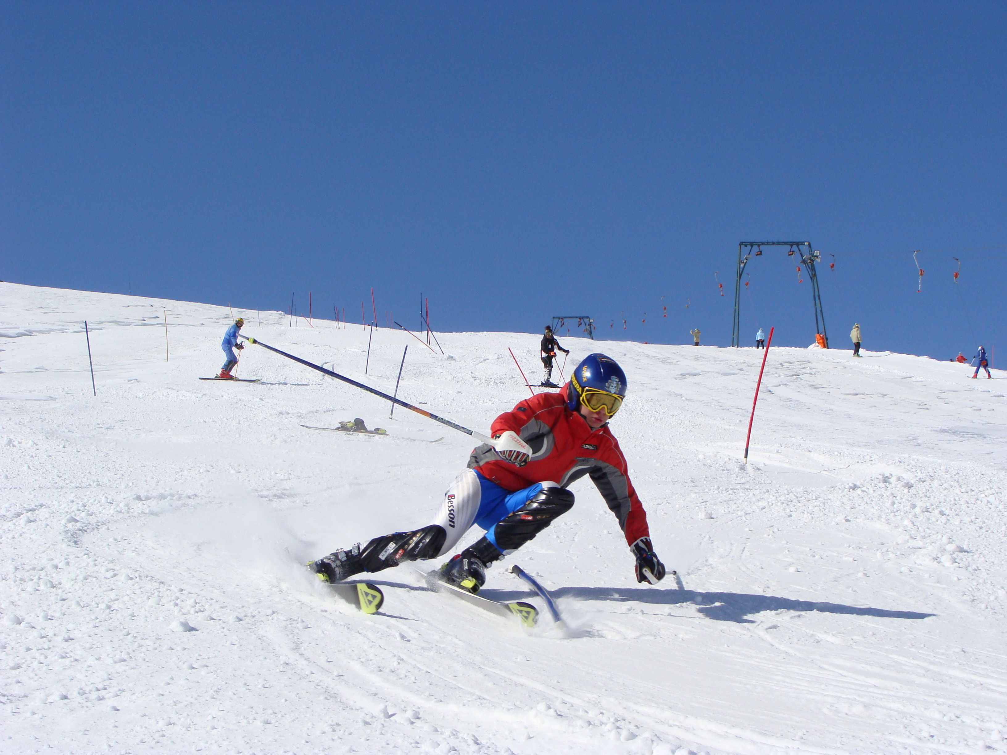 Skiing on the Kaimaktsalan, Greece